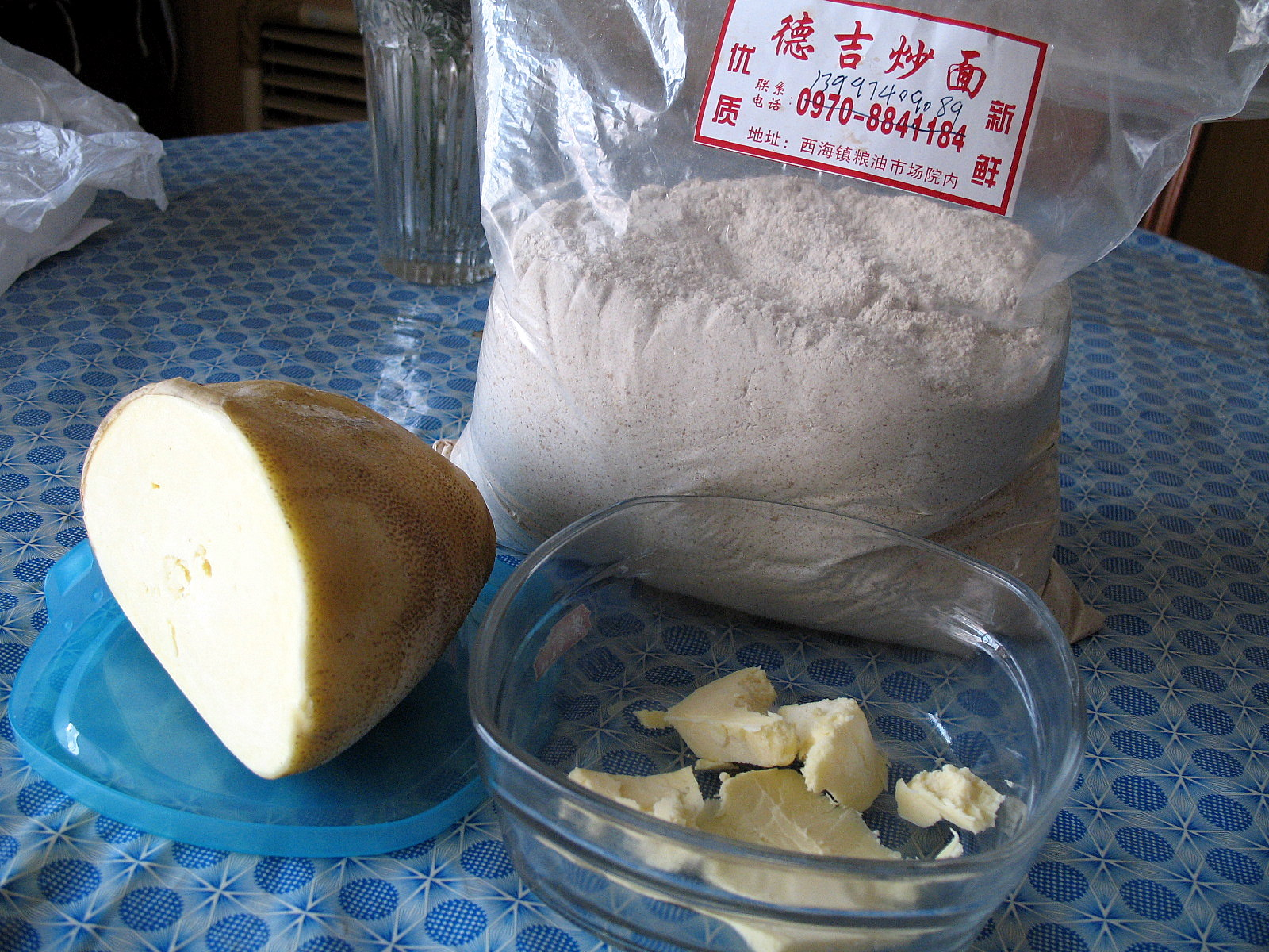 糌粑材料照